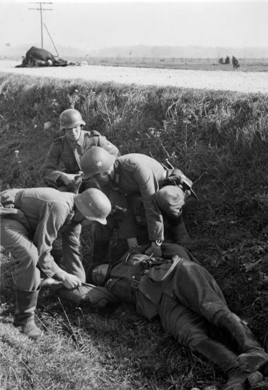 Heeresfilmstelle. Bildarchiv 355.291.6 341.321.7 Kuressaare (Ahrensburg) Insel Ösel, S.S.R. Estland 21.9.1941 Angriff auf Kuressaare. Der Filmtruppführer Ltn. Klier ist beim Angriff gefallen. II./I.R.151 Neg. Nr. : Kl. 17/24 Bildberichter: Barschdorff